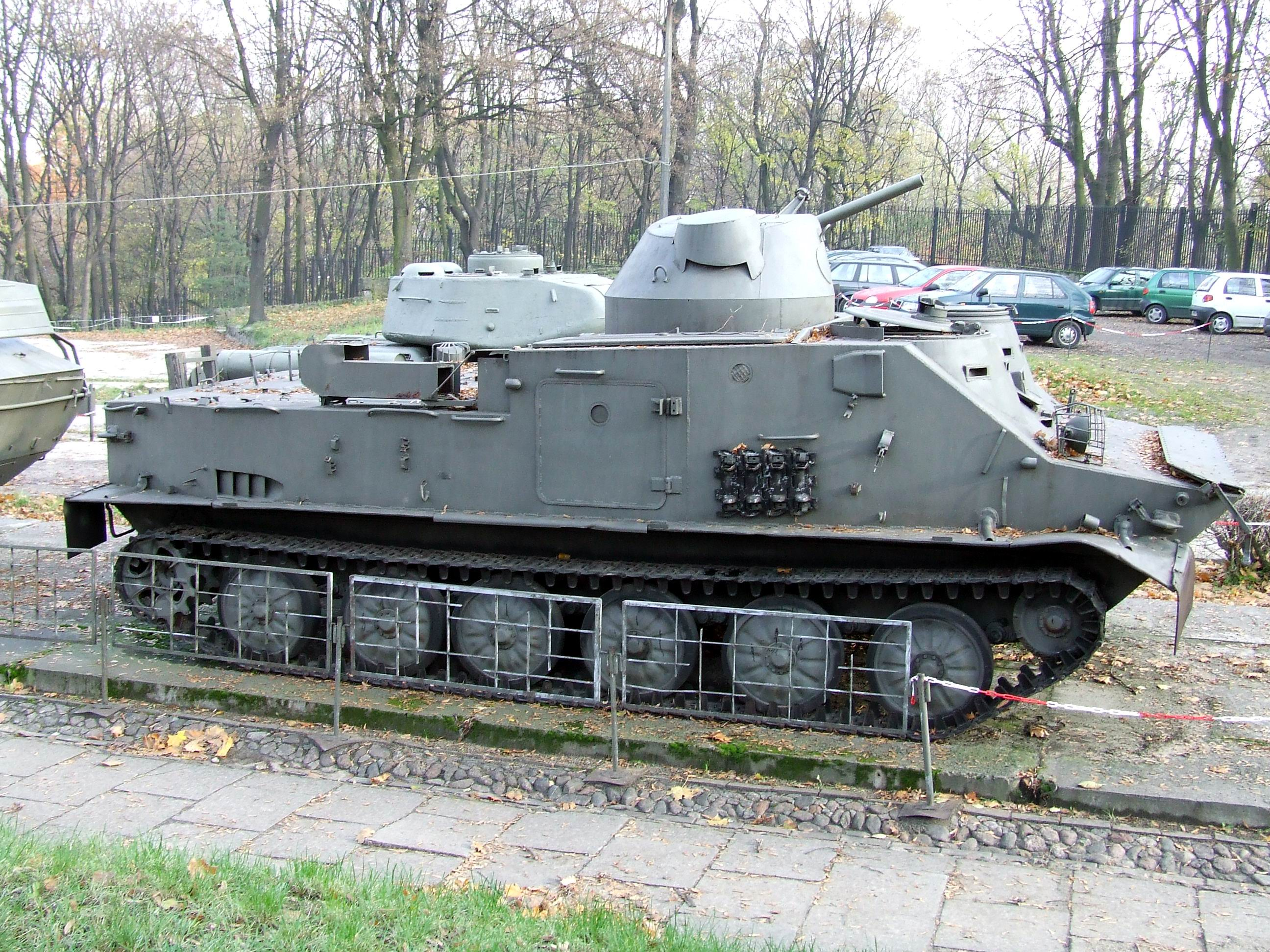 TOPAS w Muzeum Wojska Polskiego